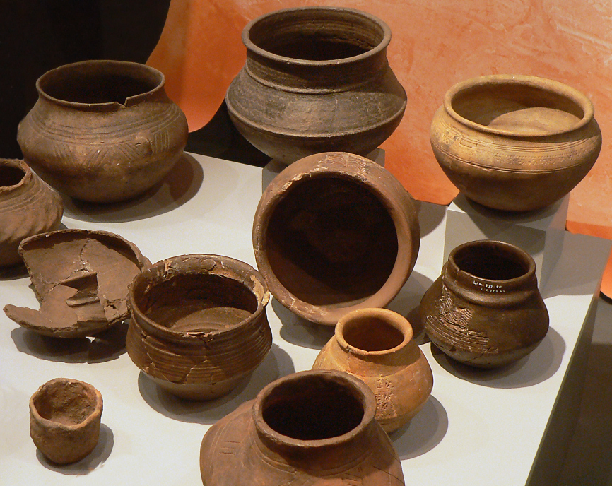 Keramische Fundstücke vom Altsächsisches Gräberfeld Liebenau, ausgestellt im Museum Nienburg, Fotoveröffentlichung in Wikimedia Commons mit Genehmigung des Museums vom 05.11.2012